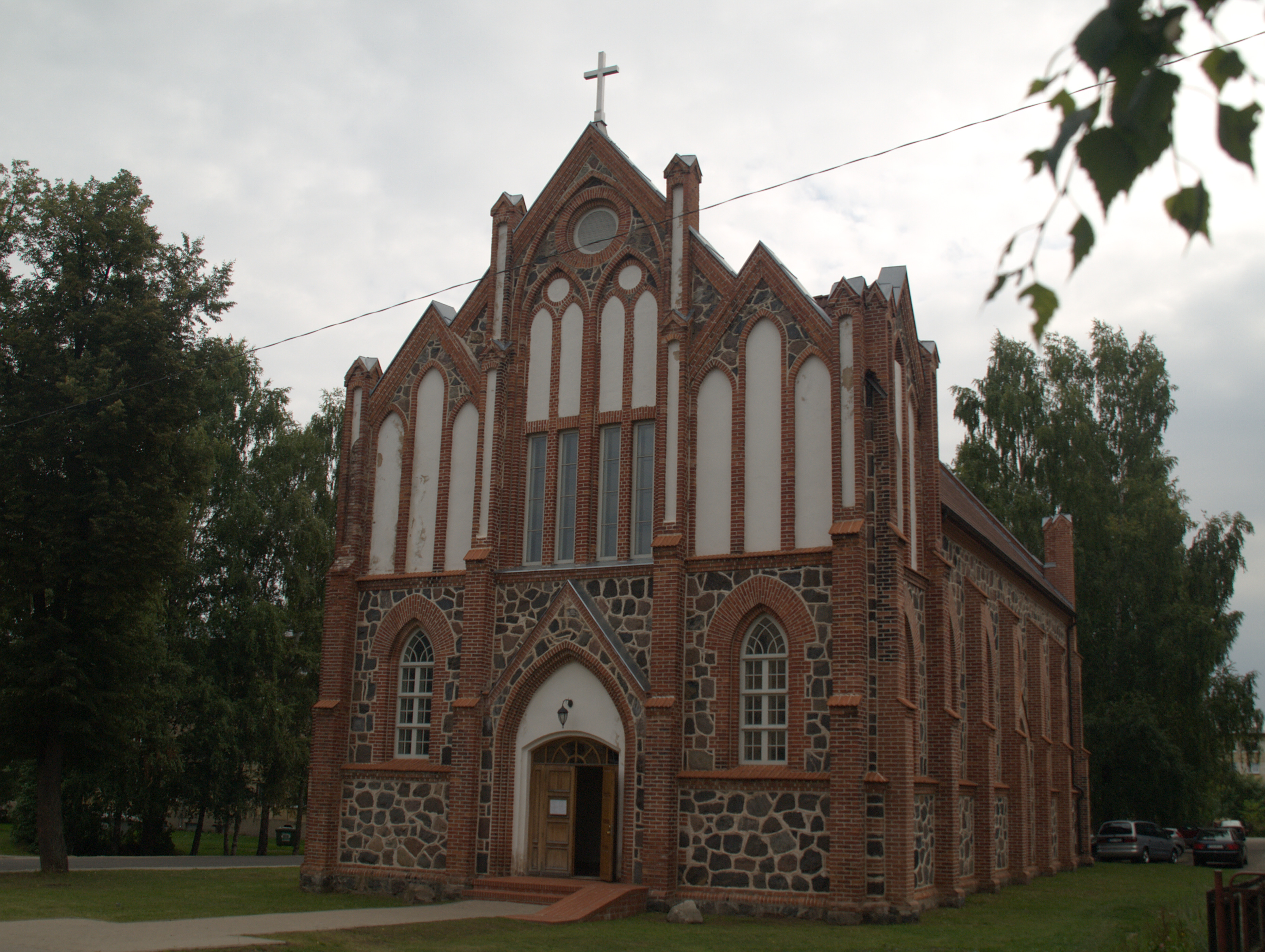 Valga katoliku kirik